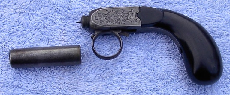 système à aiguille utilisant les premières cartouches (balle,charge, mise a feu) combustible en papier fabriqué par Mariette arquebusier Liégeois photo personnelle libre de droit